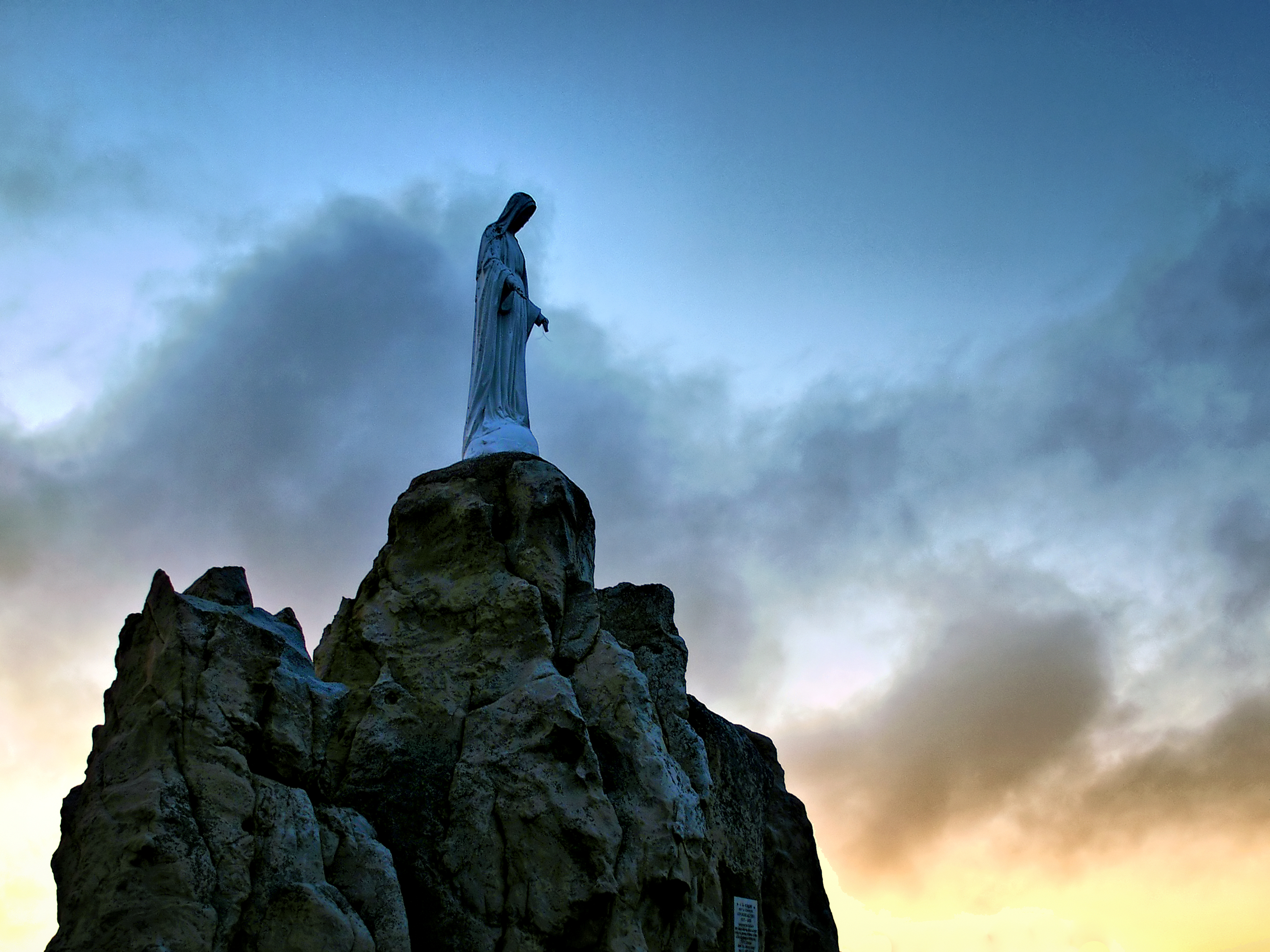 Calvi, Balagne (Corse) - Notre-Dame de La Serra dominant la ville